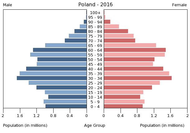 A population pyramid illustrates the age and sex structure of a country's population and may provide insights about political and social stability, as well as economic development. The population is distributed along the horizontal axis, with males shown on the left and females on the right. The male and female populations are broken down into 5-year age groups represented as horizontal bars along the vertical axis, with the youngest age groups at the bottom and the oldest at the top. The shape of the population pyramid gradually evolves over time based on fertility, mortality, and international migration trends.